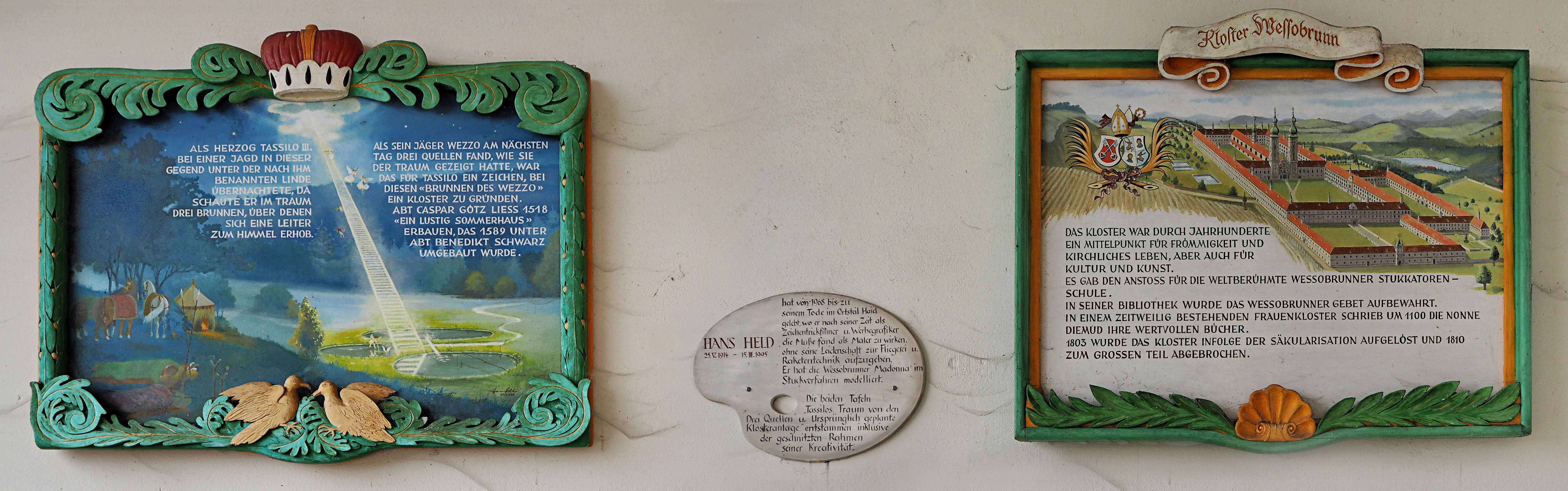 Bildtafeln des Wessobrunner Künstlers Hans Held zur Geschichte des Klosters - Holztafel im Brunnenhaus des Klosters